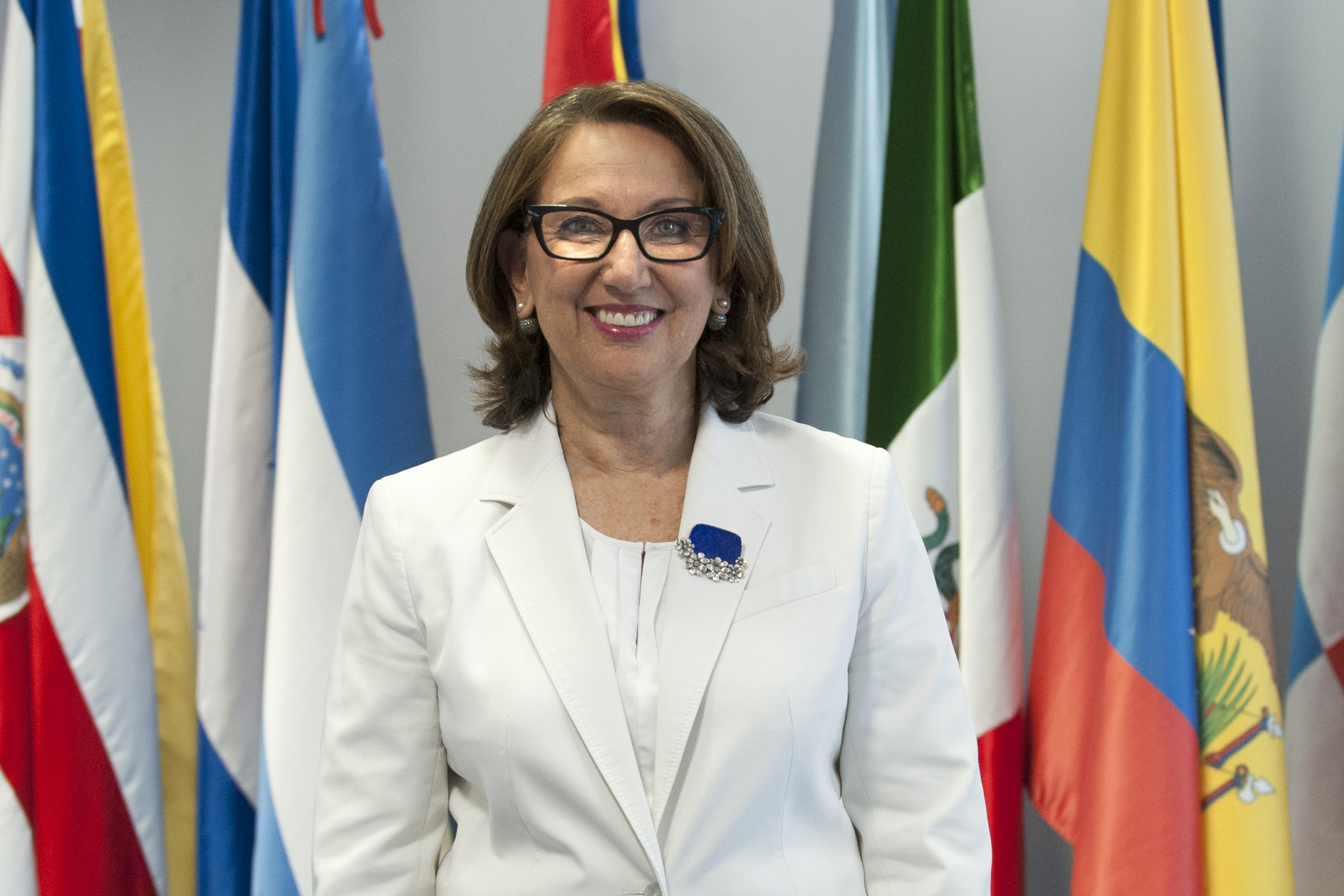 Rebeca Grynspan en la sede de la Secretaría General Iberoamericana SEGIB